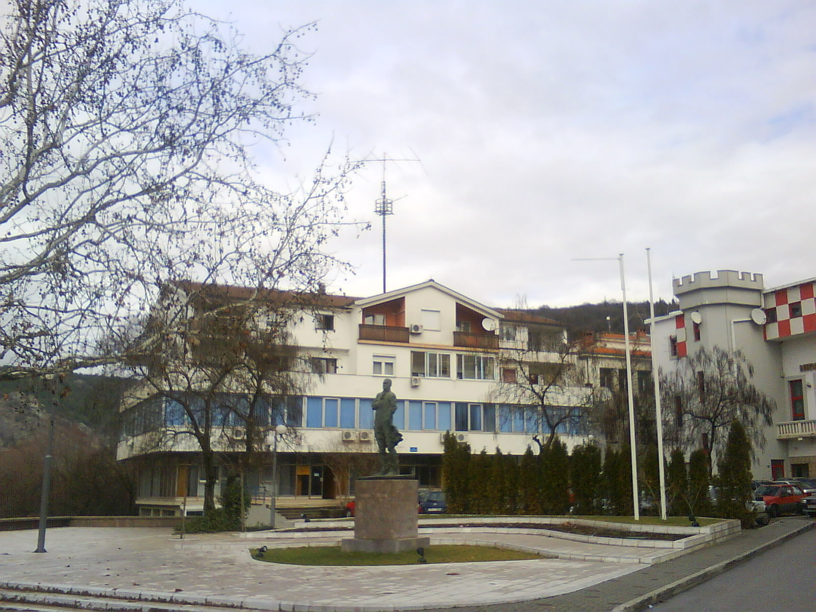 Gojko Šušak square in Široki Brijeg